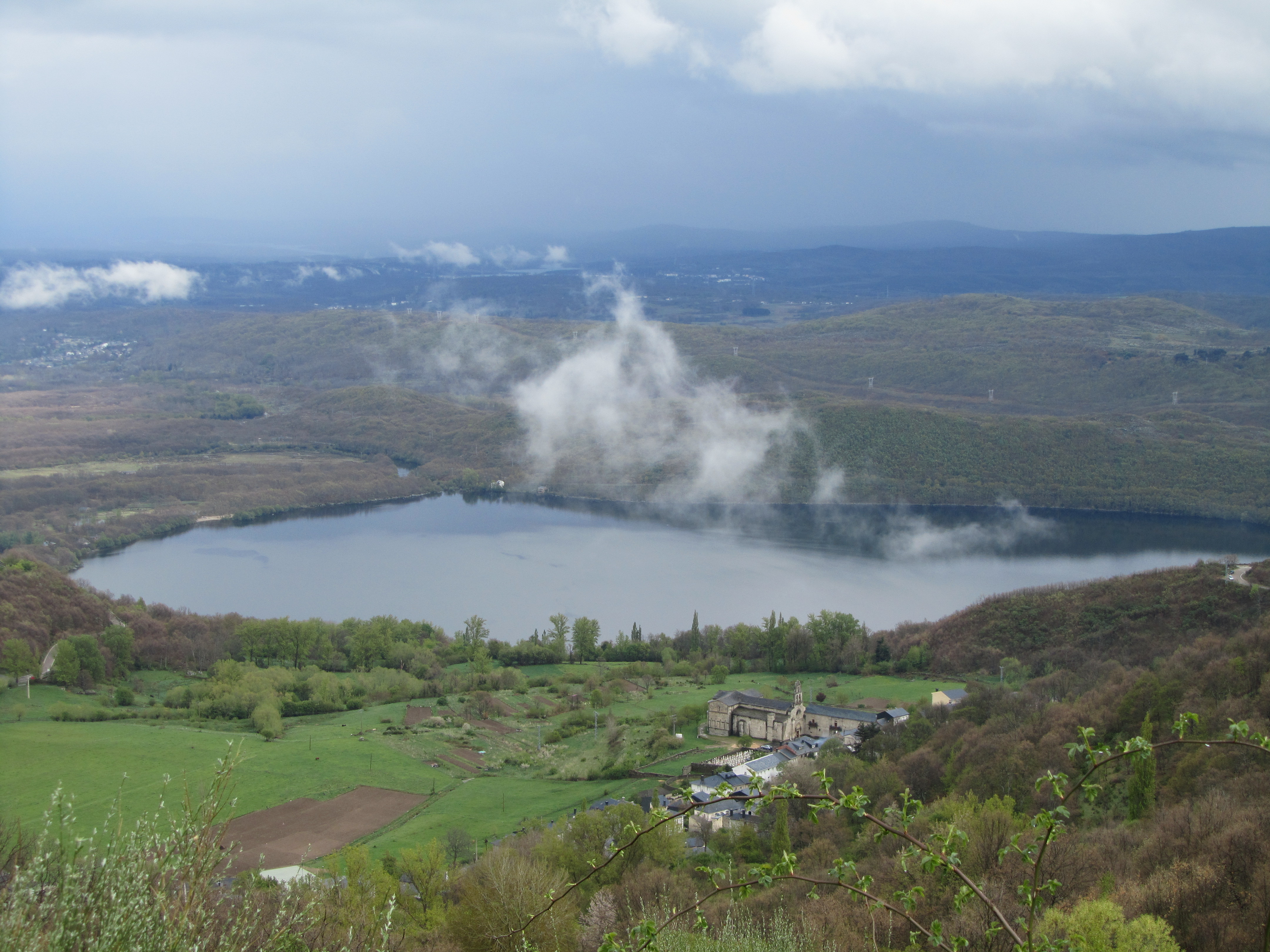 Lago de Sanabria y San Martín de Castañeda desde la carretera de montaña a la Laguna de los Peces